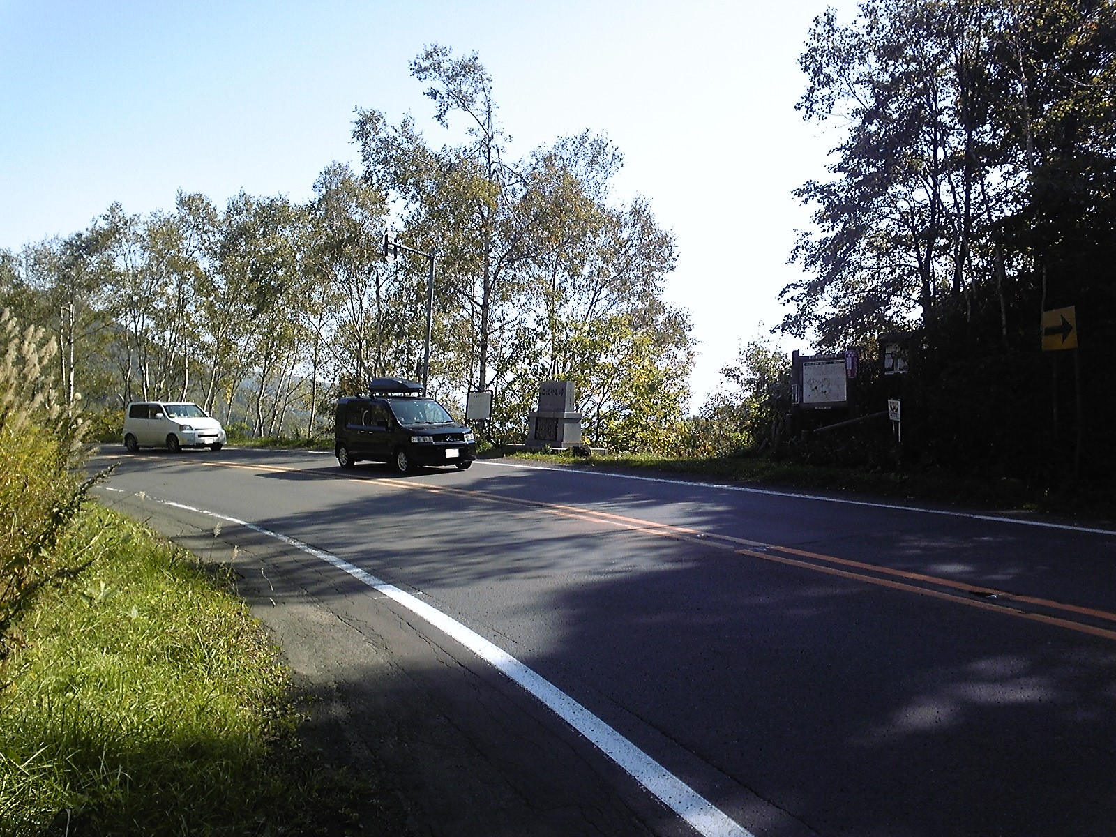 北海道札幌市小林峠